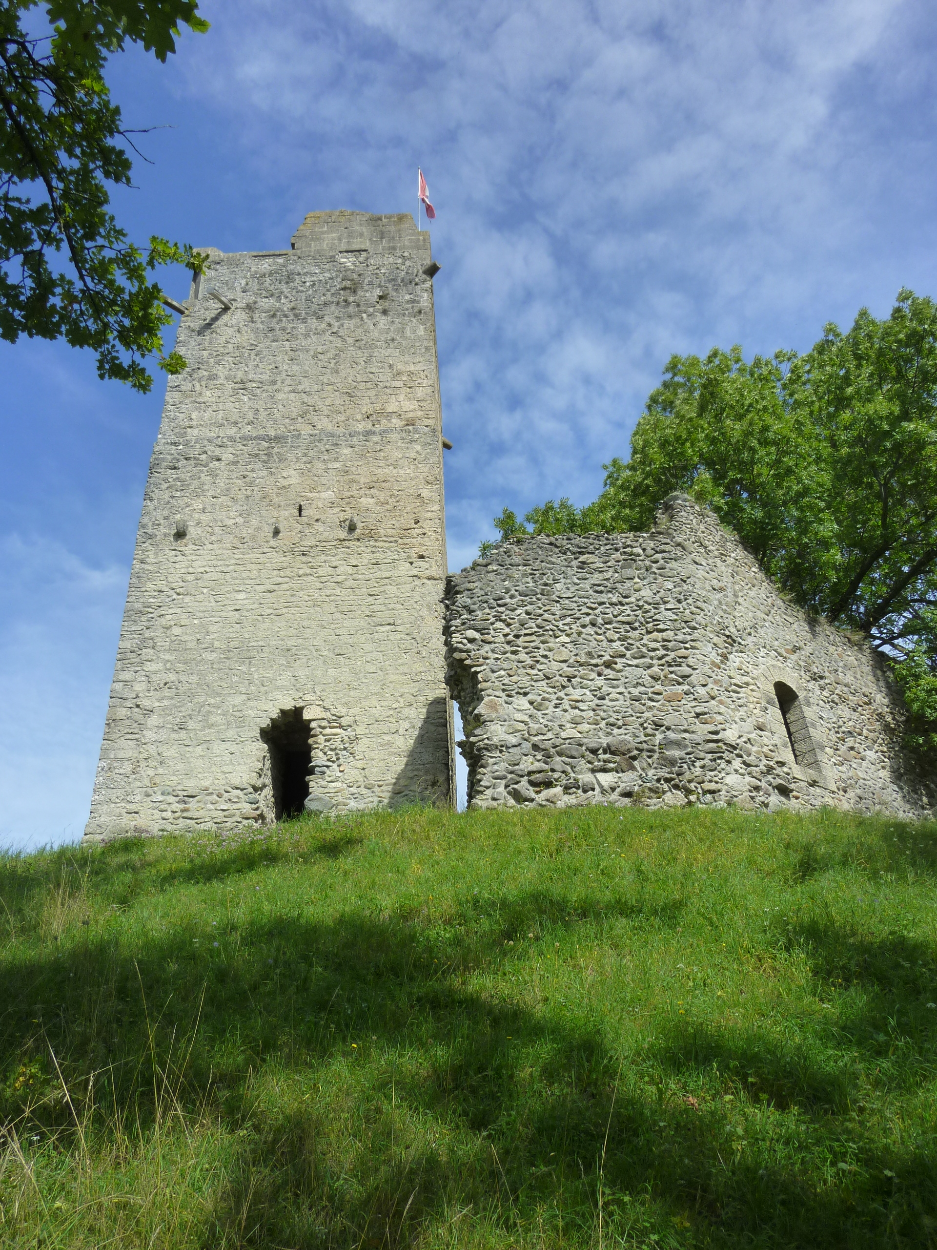 Turm St. Martin bei Chene-Paquier